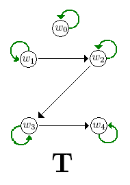 T frame